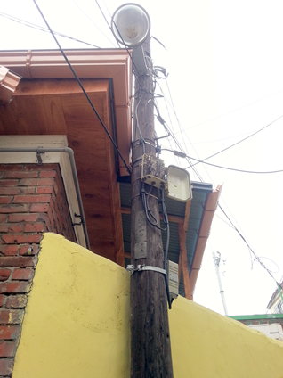 나무전봇대